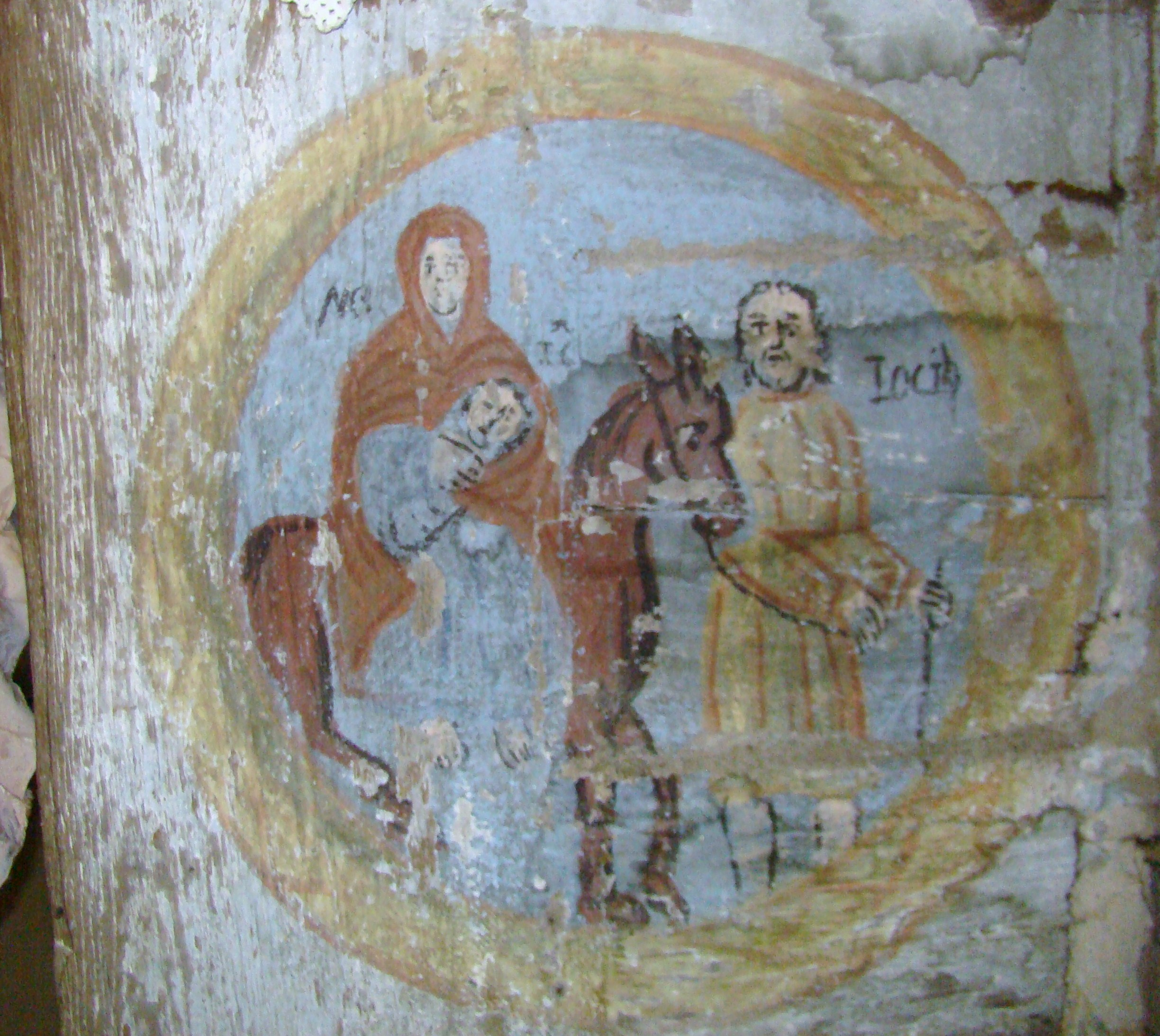 Biserica de lemn "Cuvioasa Paraschiva" , sat STEJERA; comuna MIREŞU MARE